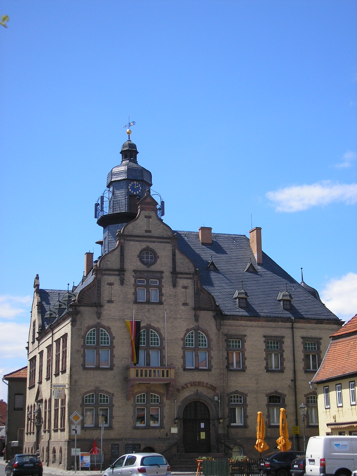 Das Rathaus in Heldrungen (Thüringen)